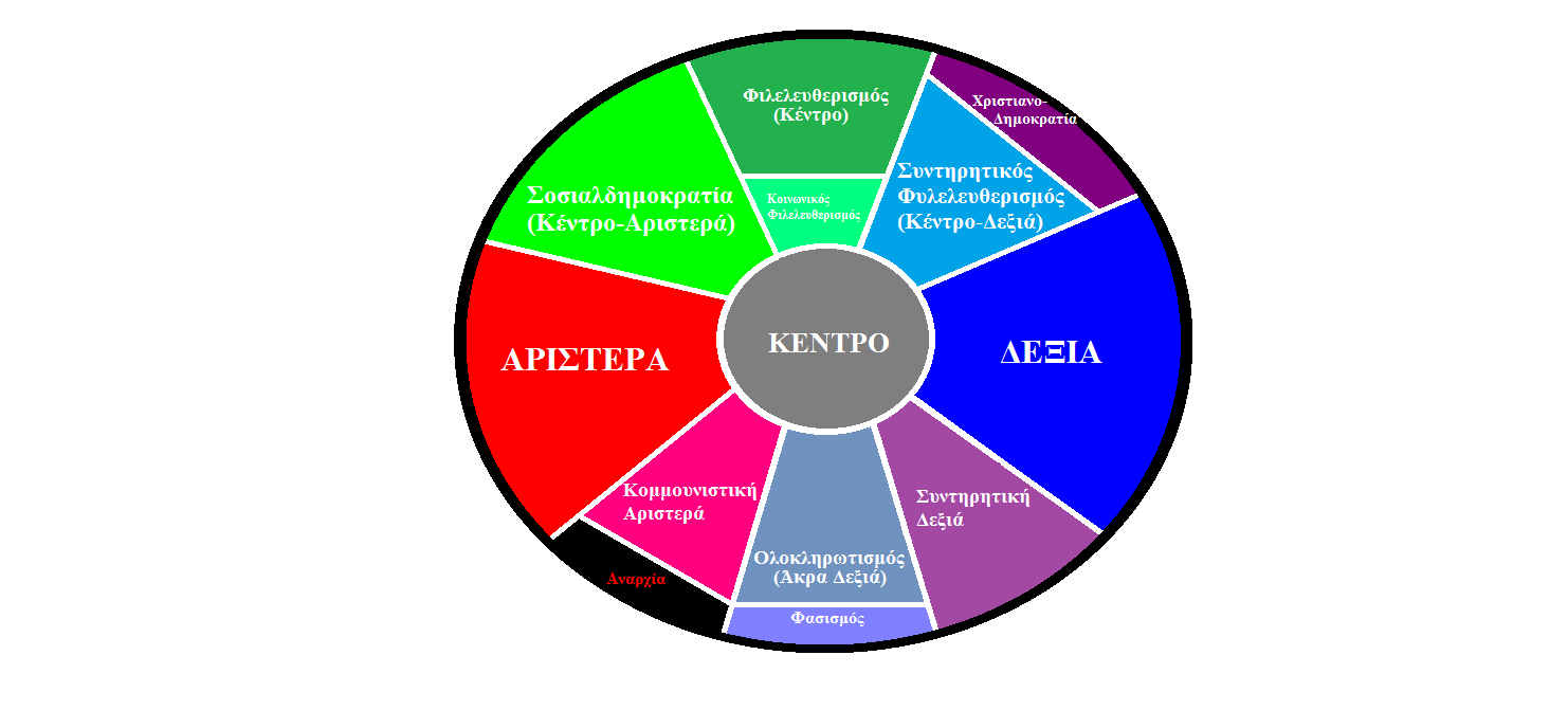 Ένα έργο δικής μου δημιουργίας εμπνευσμένο από το quiz φυσικά έχω κάνει διορθώσεις.